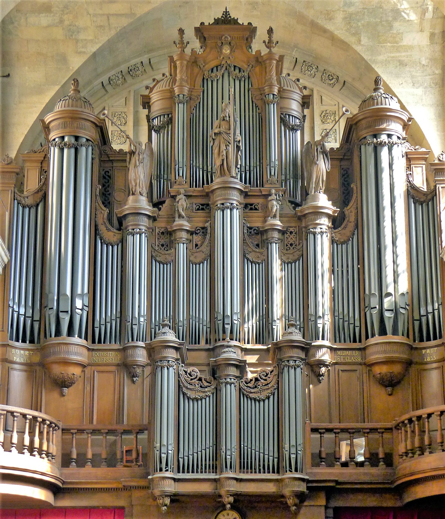 Église Sainte-Élisabeth-de-Hongrie - Paris III